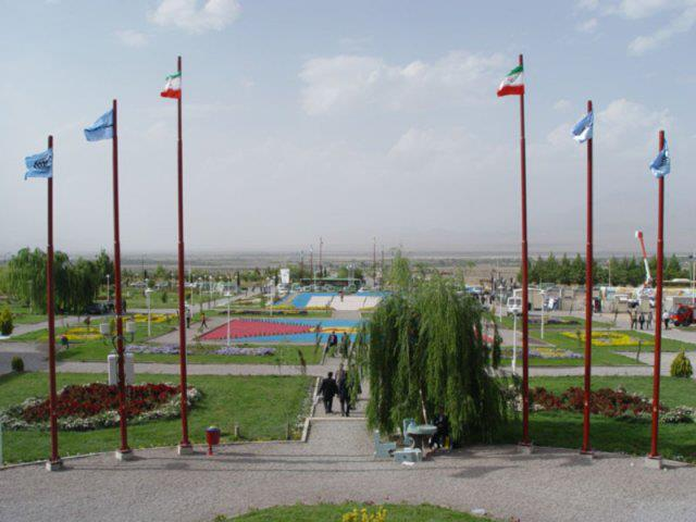 HiTech